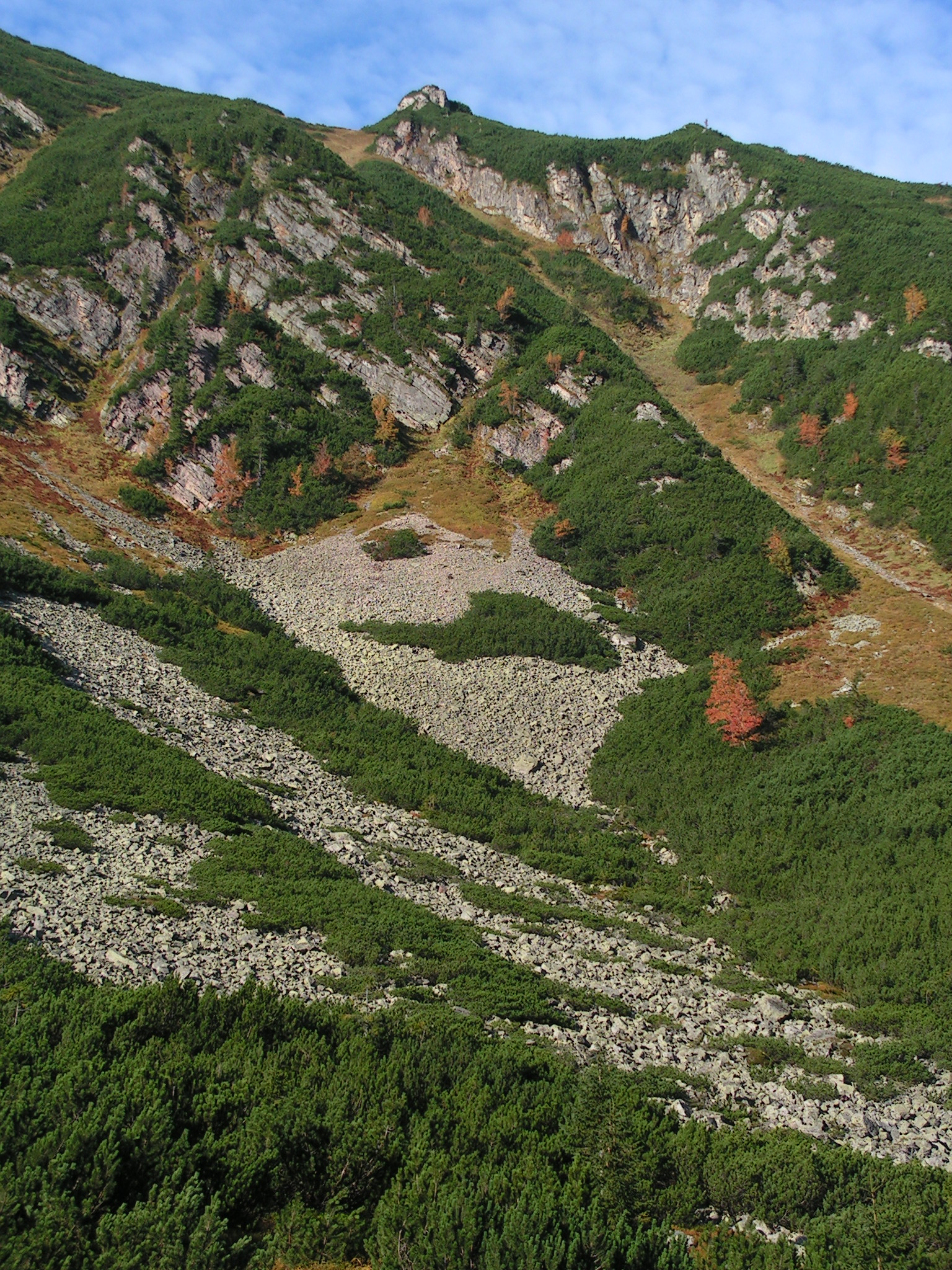 Sedlo pod Žltou kopou a Samojedna skalka – pohľad z Kolovej doliny.